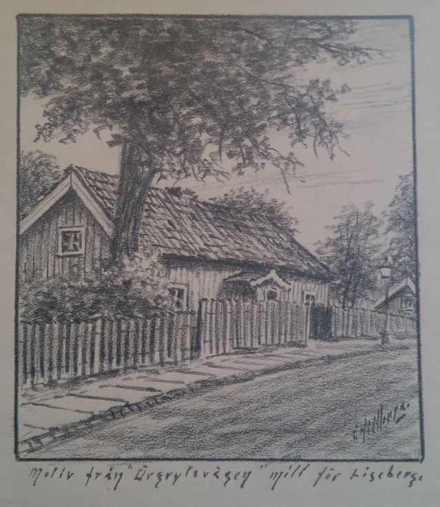 Kolteckning av Einar Hillberg föreställande Örgrytevägen i Göteborg